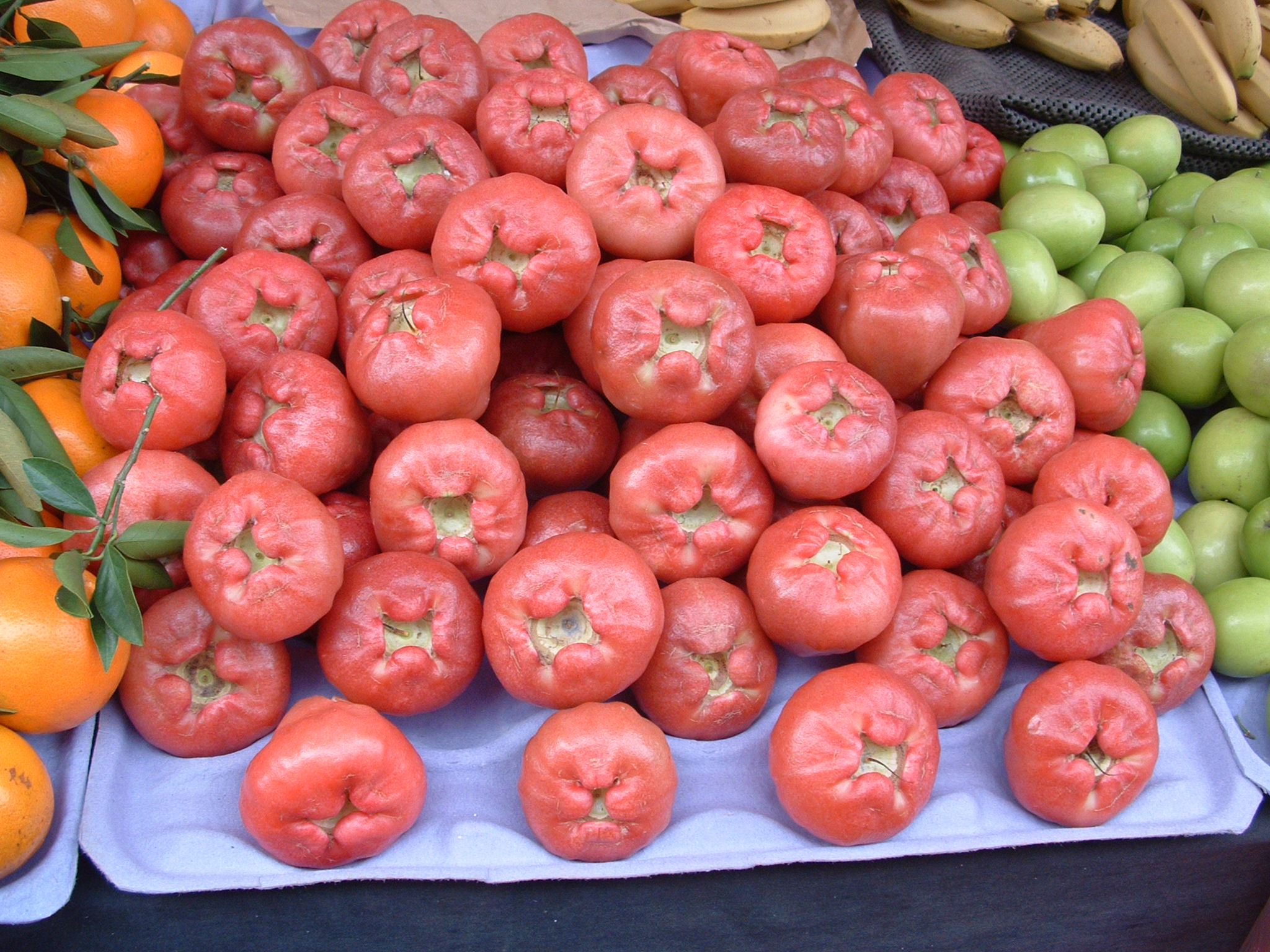 蓮霧, 攝於臺灣三義, 鍾婷婷 (Rachel Chung)